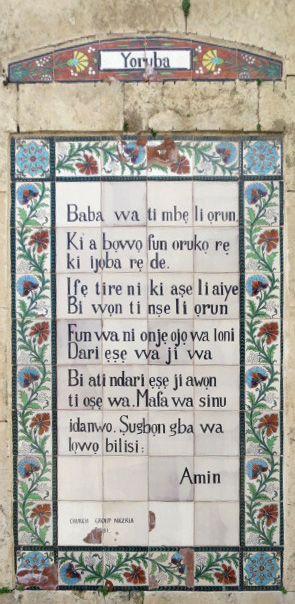 Church of the Pater Noster, Mount of Olives, Jerusalem, Israel כנסיית אבינו שבשמים Sanctuary of the Eleona